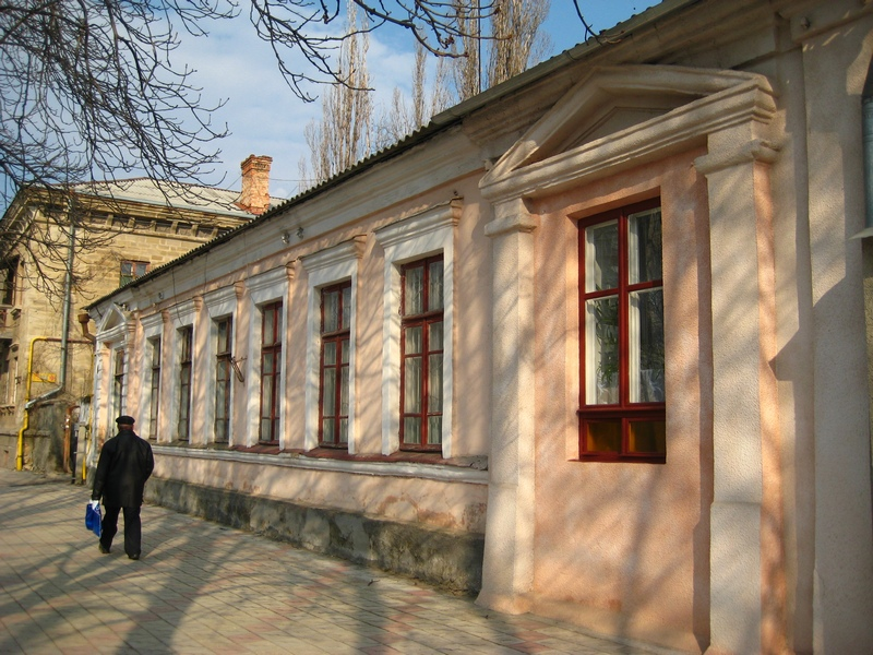 Бывший дом Хаима Капусты